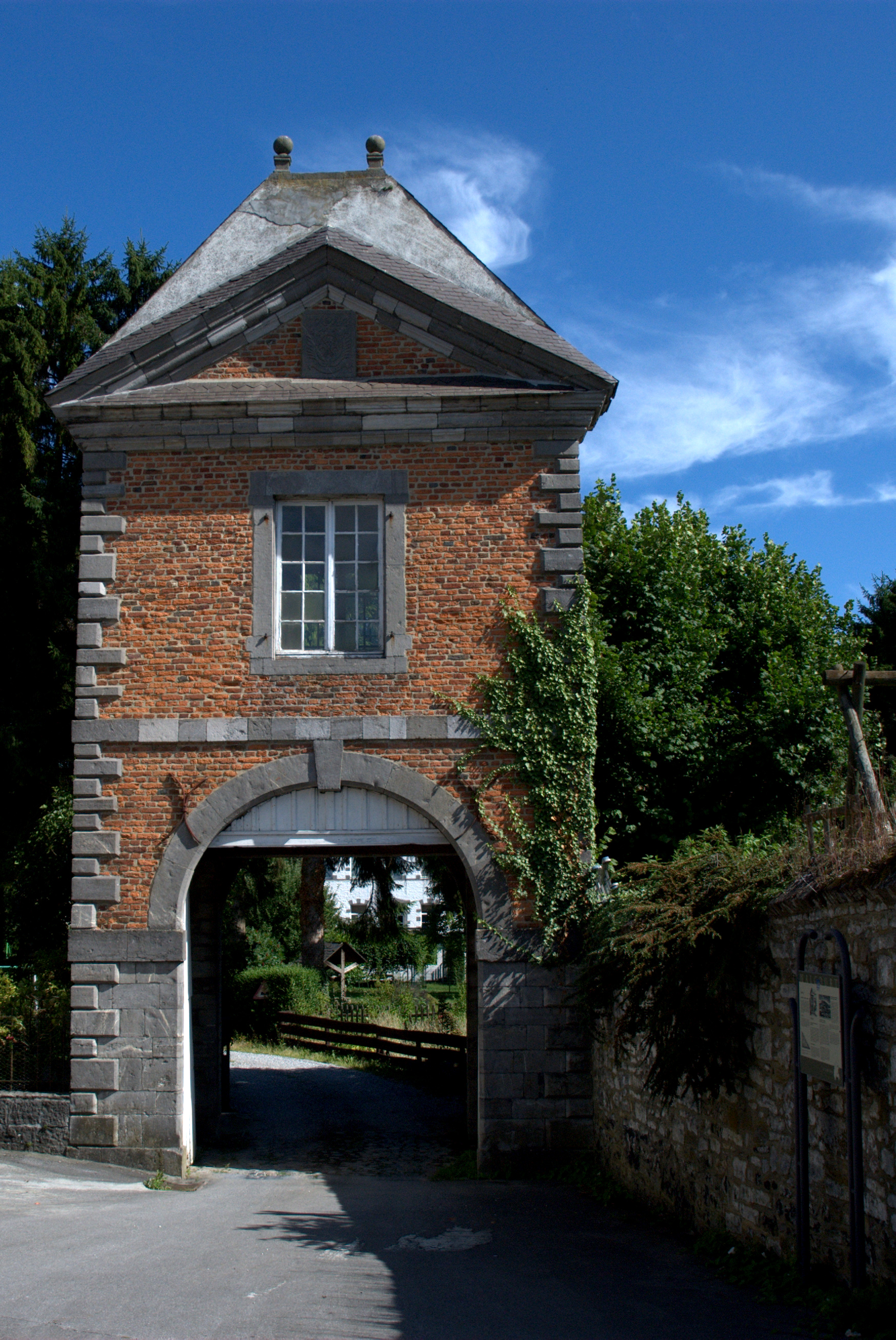 Poortgebouw van de intussen verdwenen Cisterciënzerinnenabdij Le Jardinet te Walcourt, België